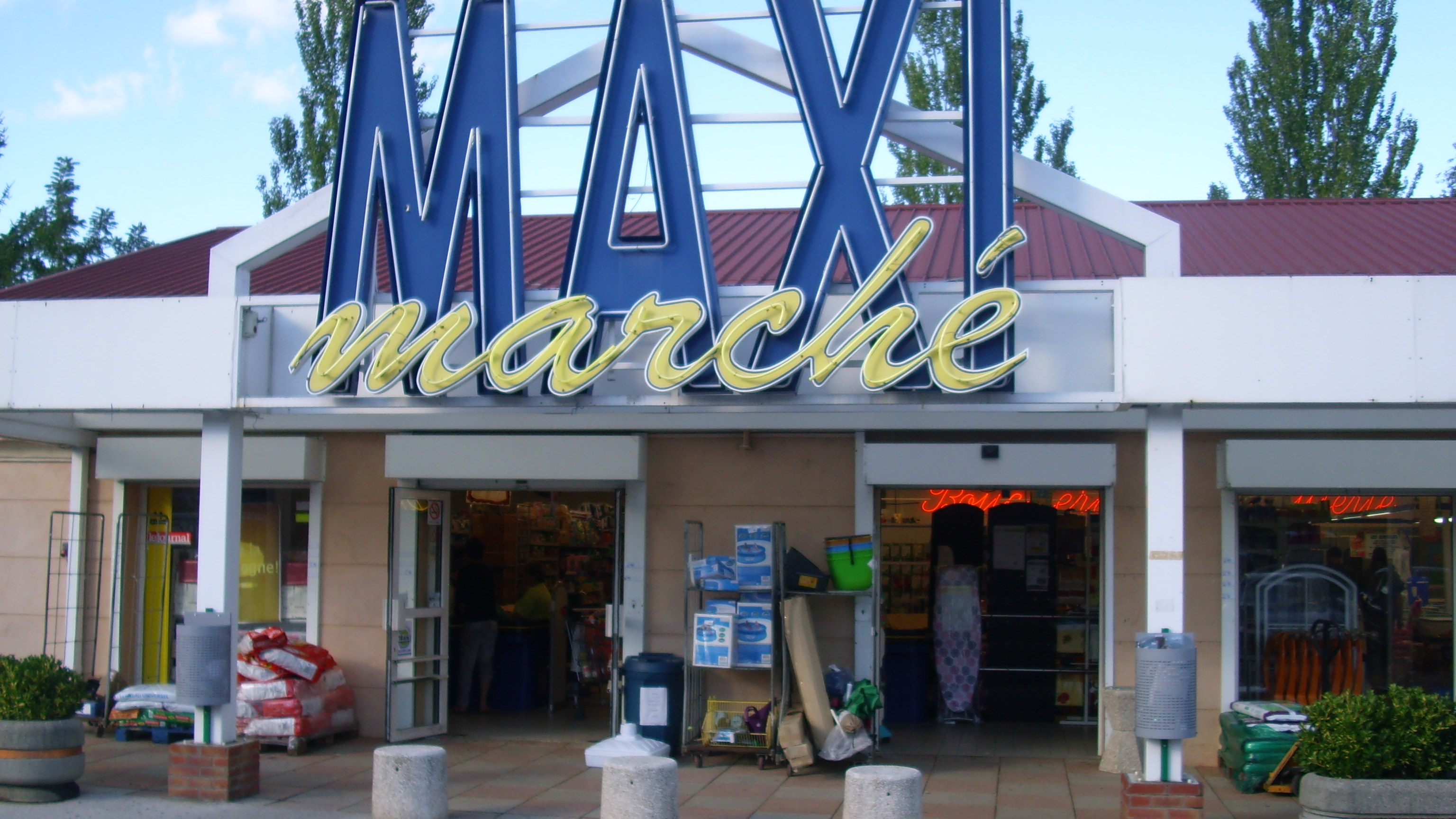 Vue de l'entrée d'un supermarche (Maxi-Marché)